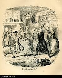 Beau Didapper essaie de briller en compagnie